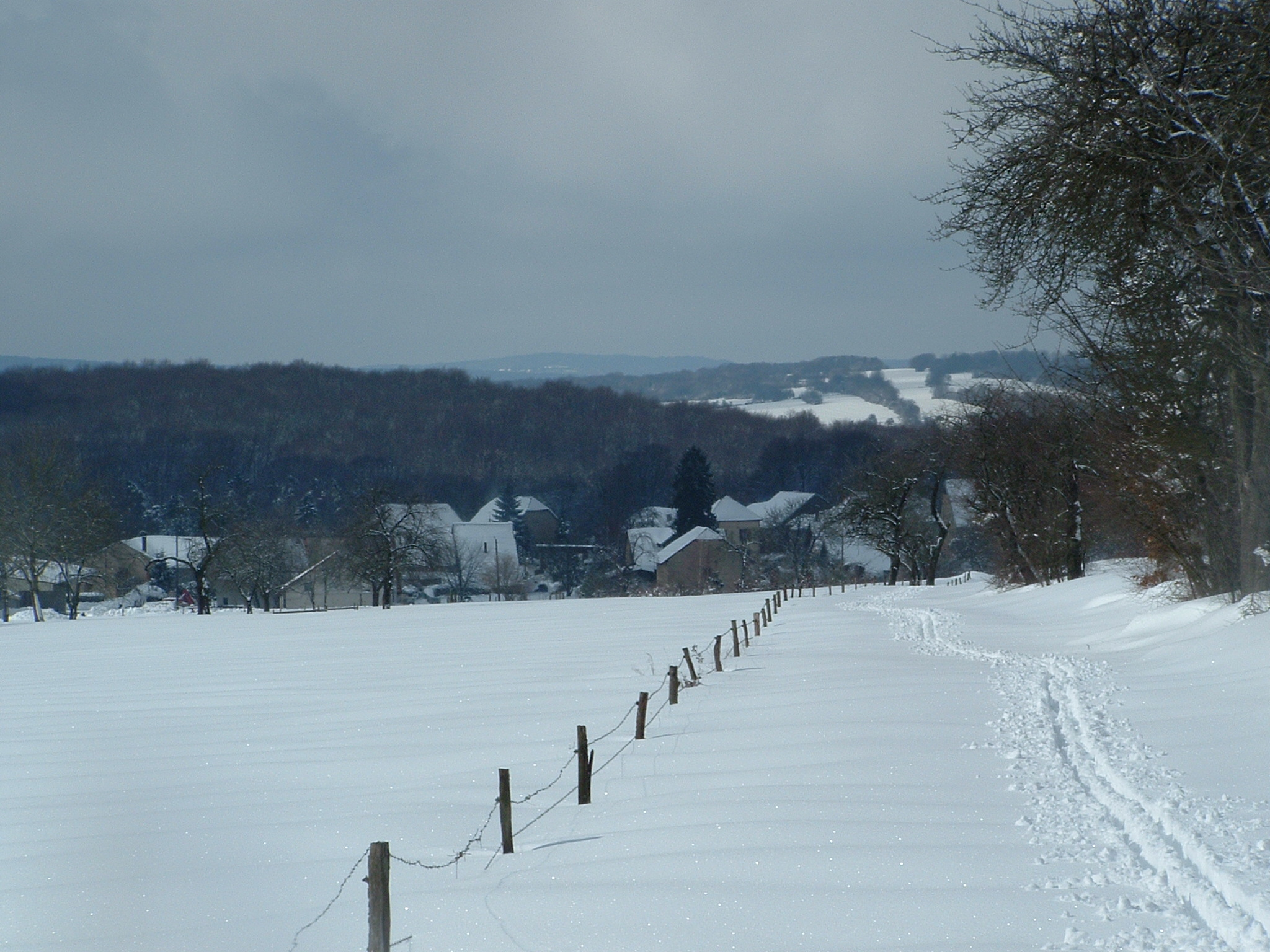 Etrappe depuis la Gravellière